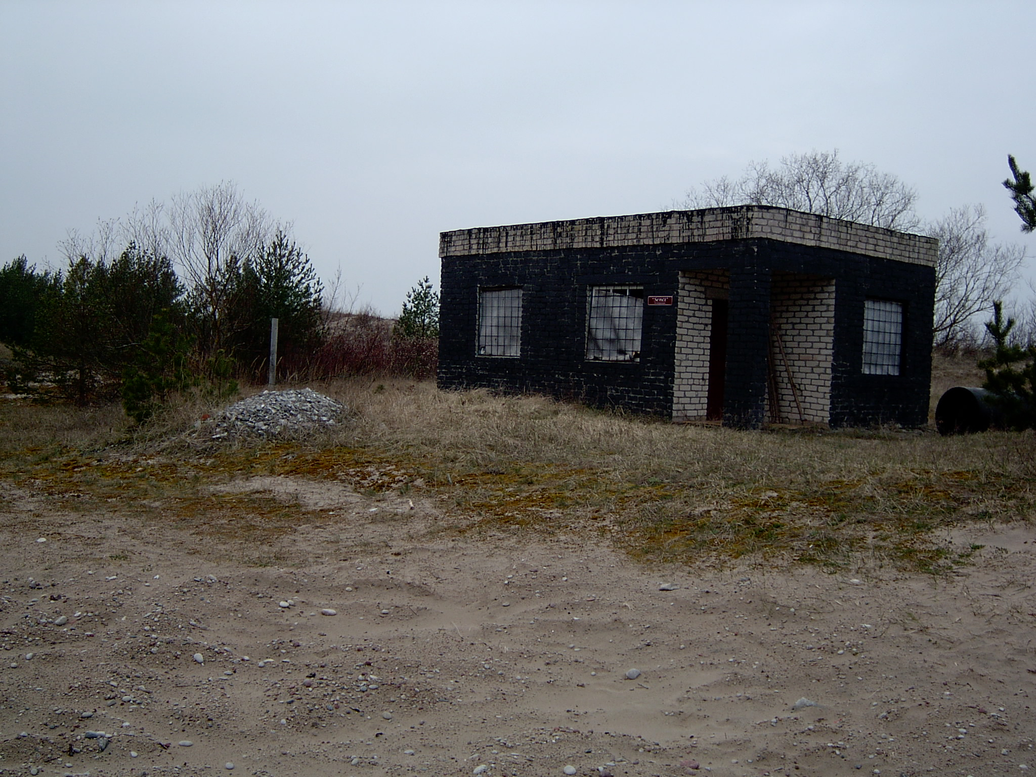 Tārgale parish, Latvia